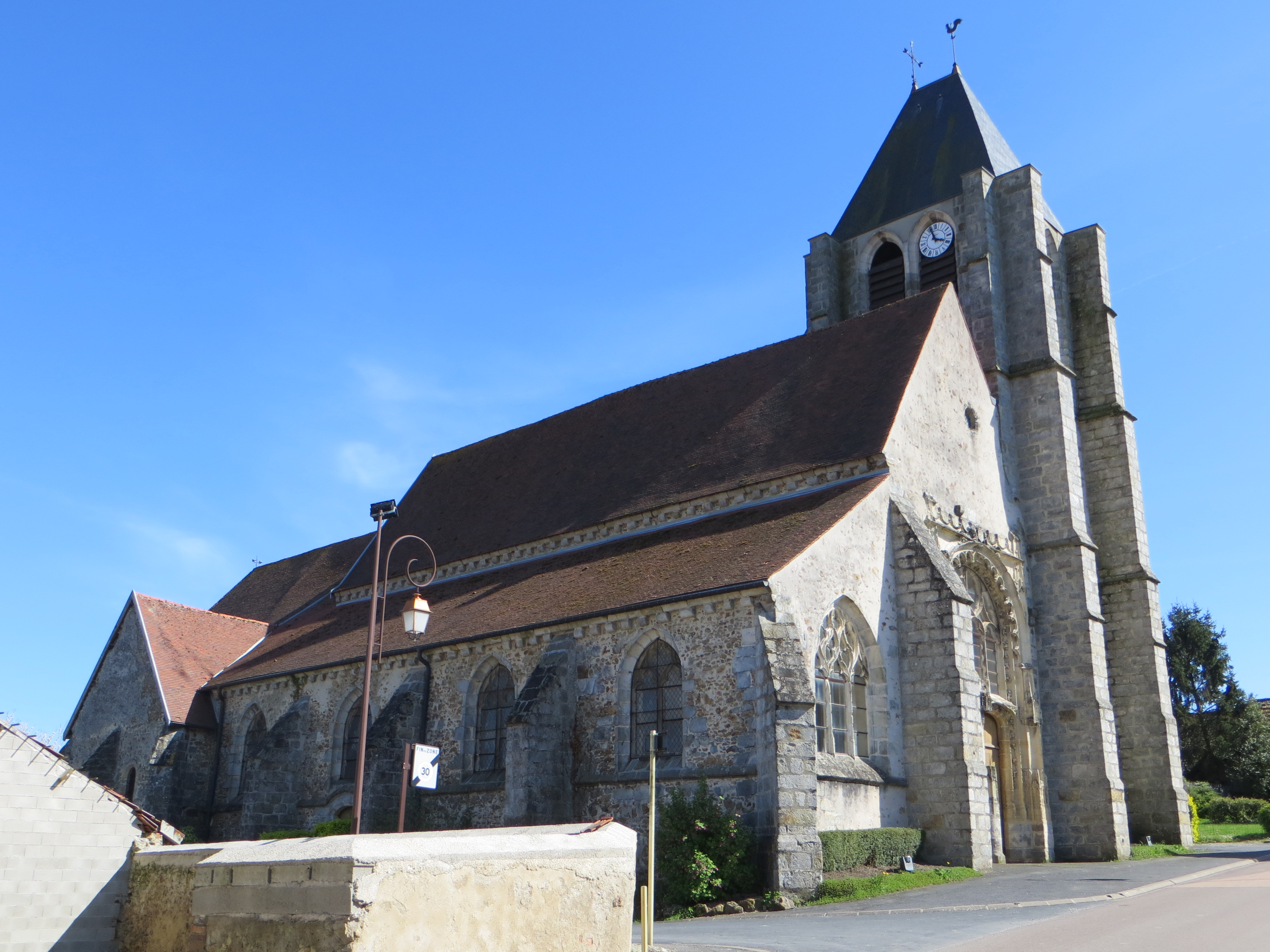 Vue générale de l'église